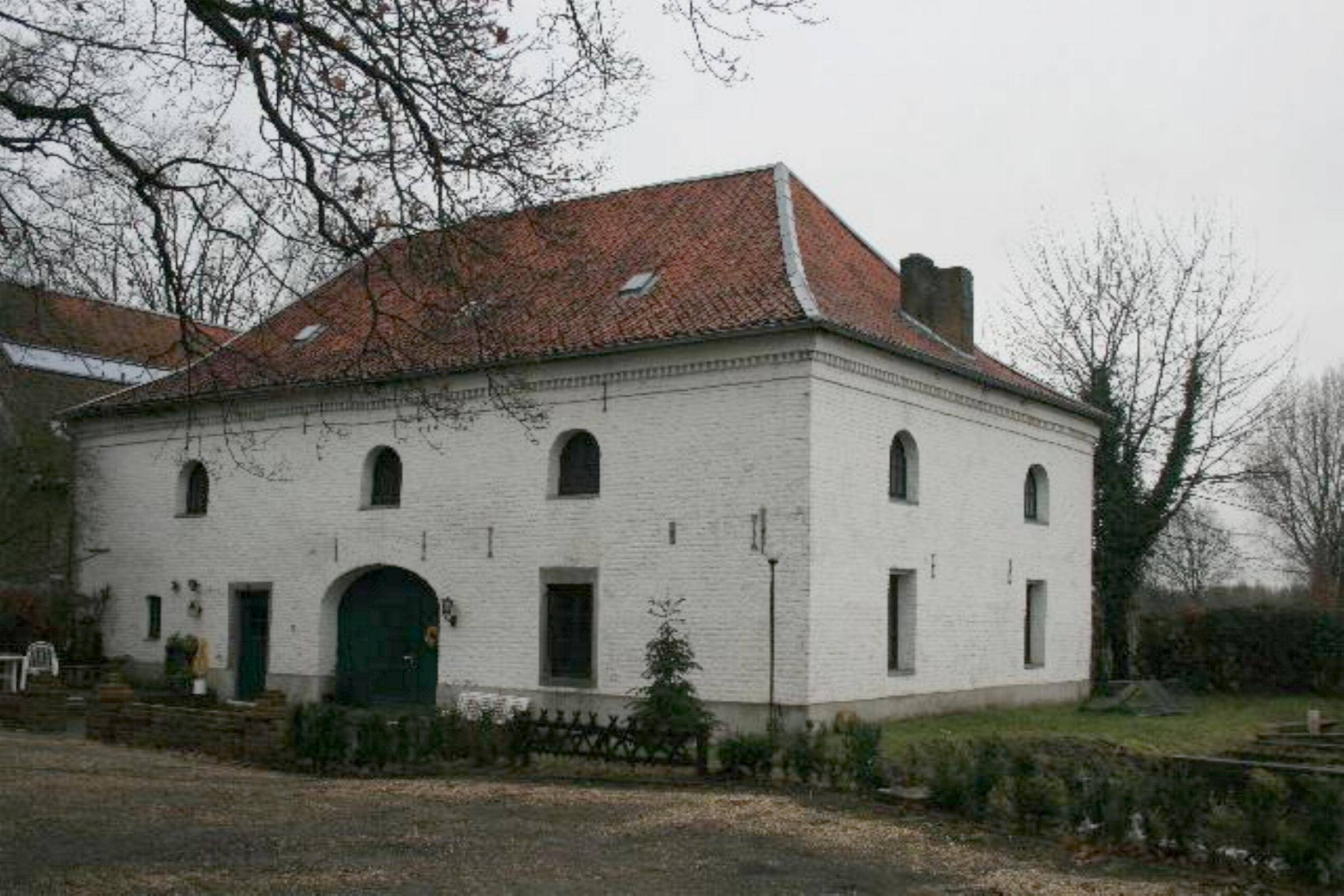 Die Millener Mühle auf der rechten deutscher Seite